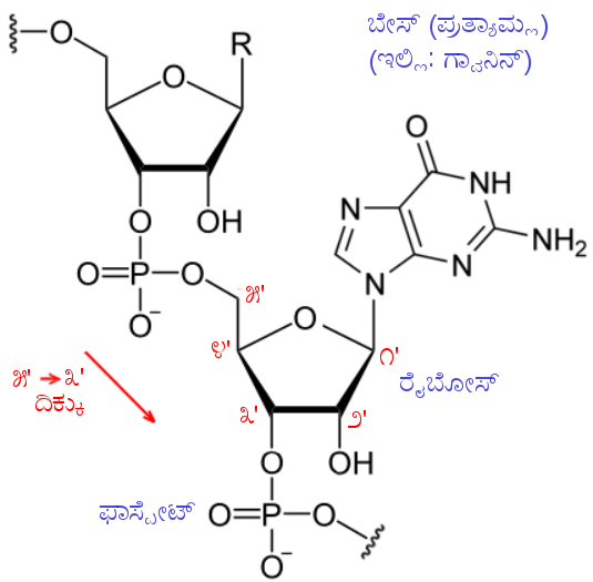 ಕನ್ನಡ: ಆರ್‌ಎನ್ಎ ರಸಾಯನಿಕ ರಚನೆ: ಸಕ್ಕರೆಯ ಅಣು ಭಾಗಕ್ಕೆ ಸಂಖ್ಯೆ ಕೊಟ್ಟಿದ್ದು, ದಿಕ್ಕನ್ನು ಸಹ ಸೂಚಿಸಲಾಗಿದೆ.